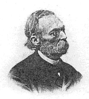 Victor Henry. Fichier scanné par B. Van Eeckhout, tiré d’une photographie originale, provenant du patrimoine de la famille Van Eeckhout.